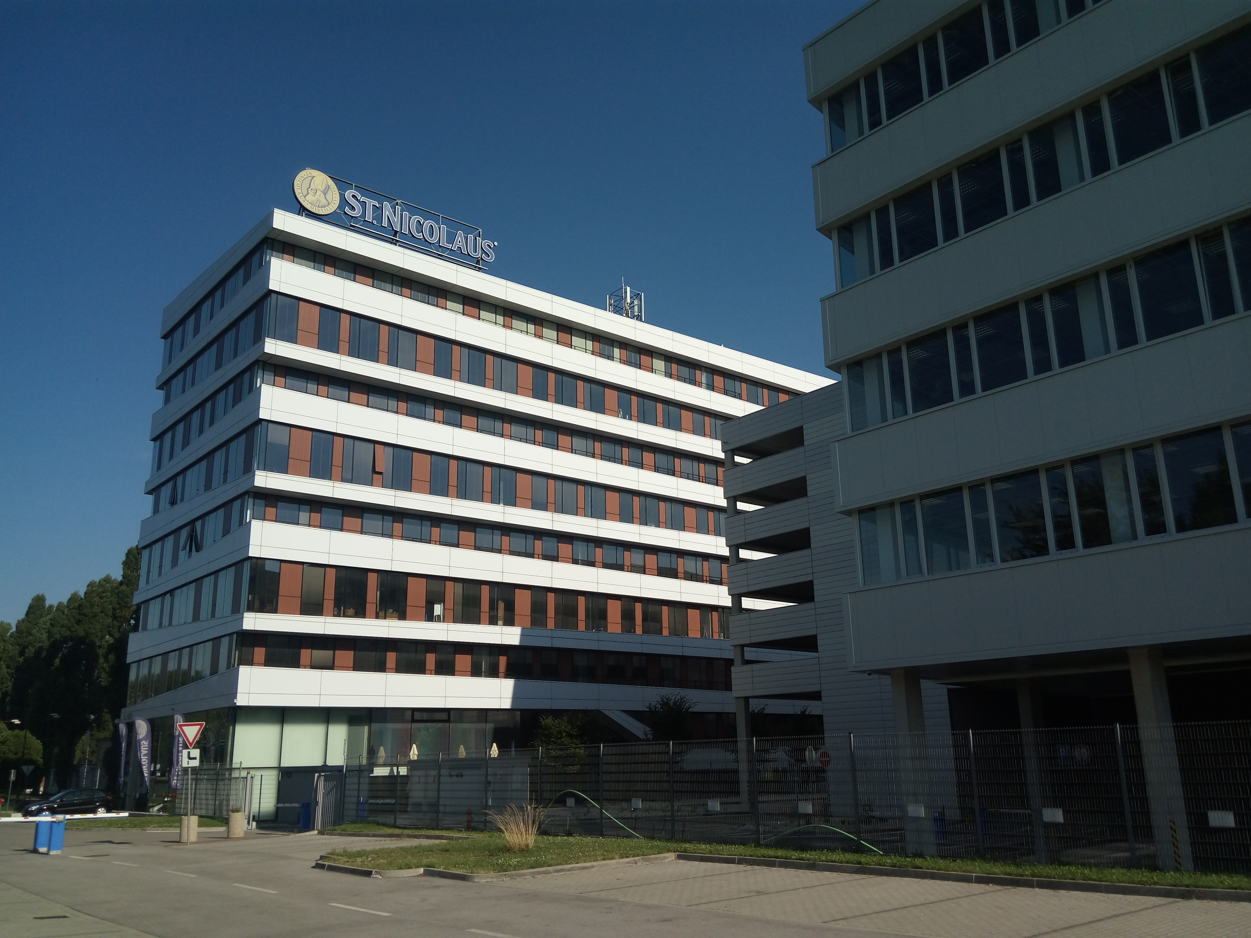 Trnavská cesta 100, Ružinov, Bratislava